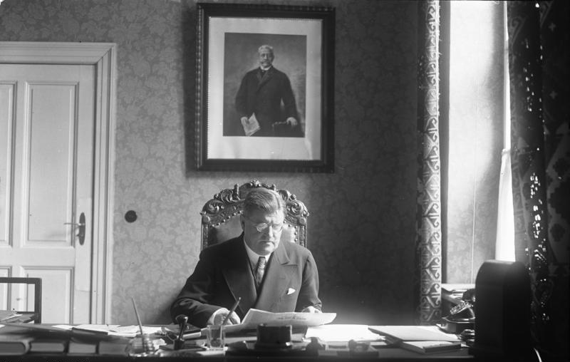 Staaatssekretär Meißner